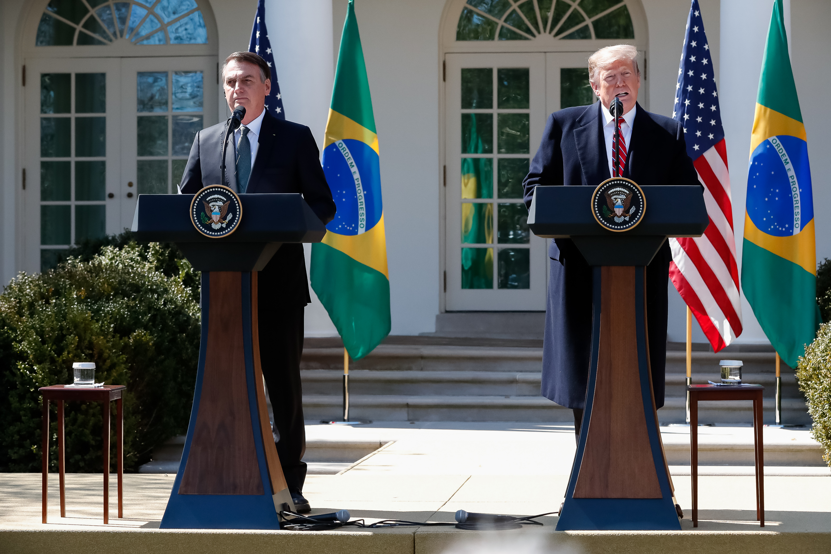 (Washington, DC - EUA, 19/03/2019) Presidente da República, Jair Bolsonaro responde perguntas da imprensa durante o encontro. Foto: Alan Santos/PR